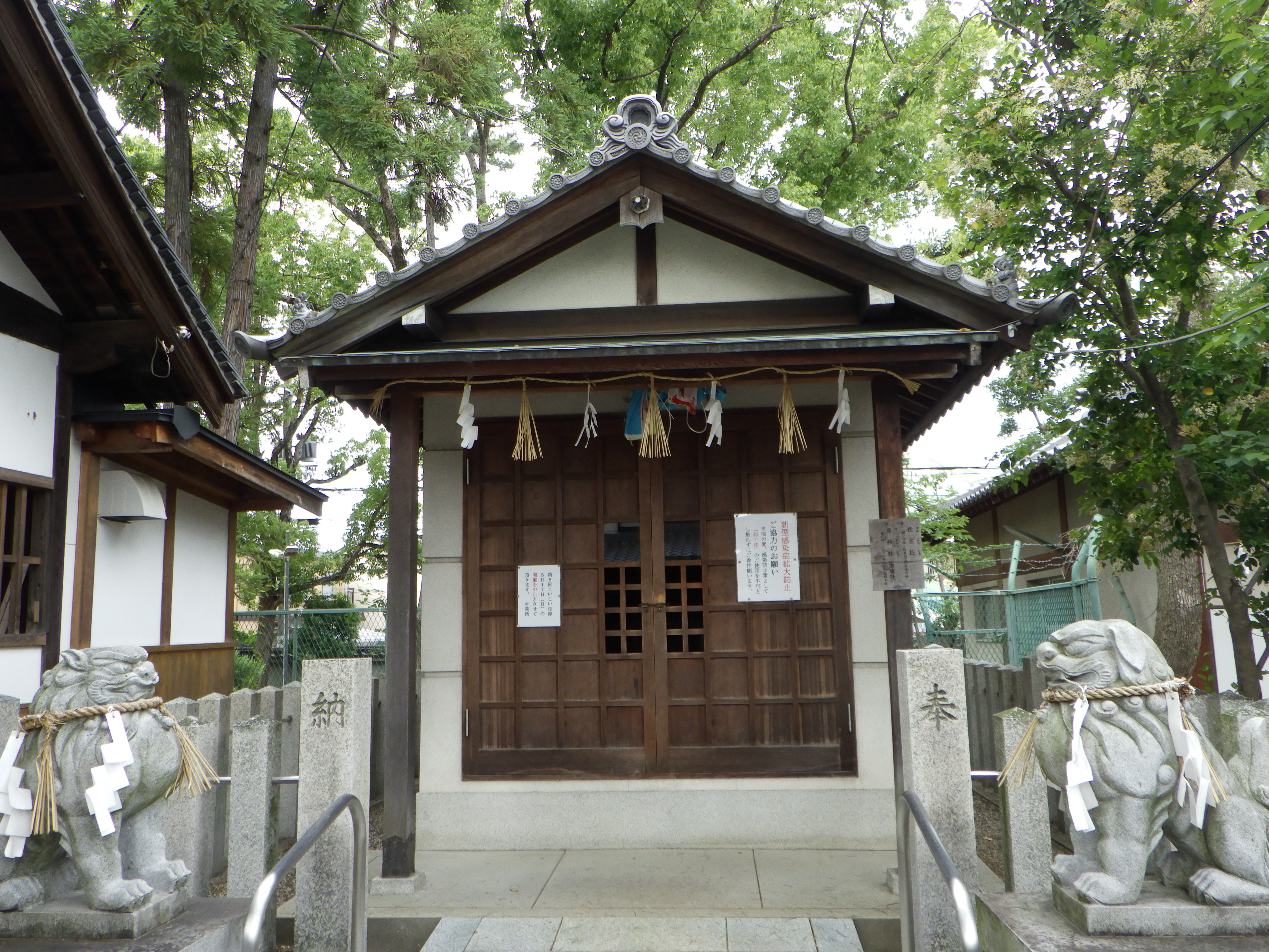 大阪府松原市にある柴籬神社内の歯神社